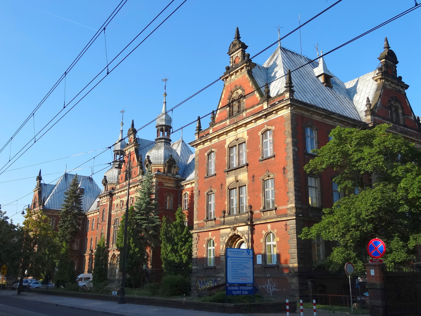 Budynek dawnej dyrekcji Kolei Wschodniej w Bydgoszczy, ul. Dworcowa 63, zbud. 1886-1889, od 2013 r. w gestii Collegium Medicum UMK